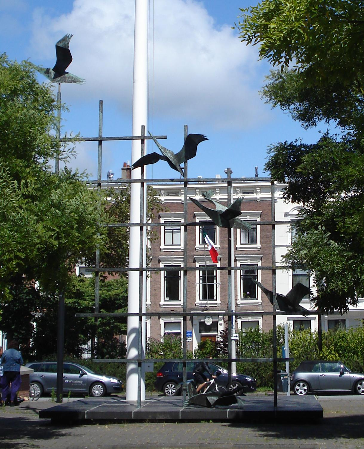 Den Haag, Burg. de Monchyplein. Bevrijdingsmonument "Irene" van Aart van den IJssel en JJA Smets. Den Haag/The Netherlands.